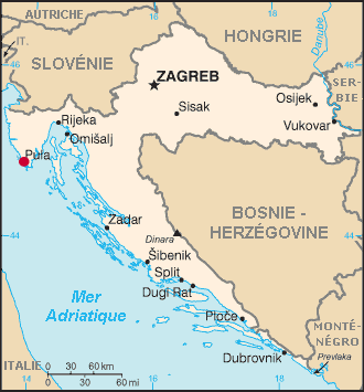 Lag vu Pula op der Kaart .